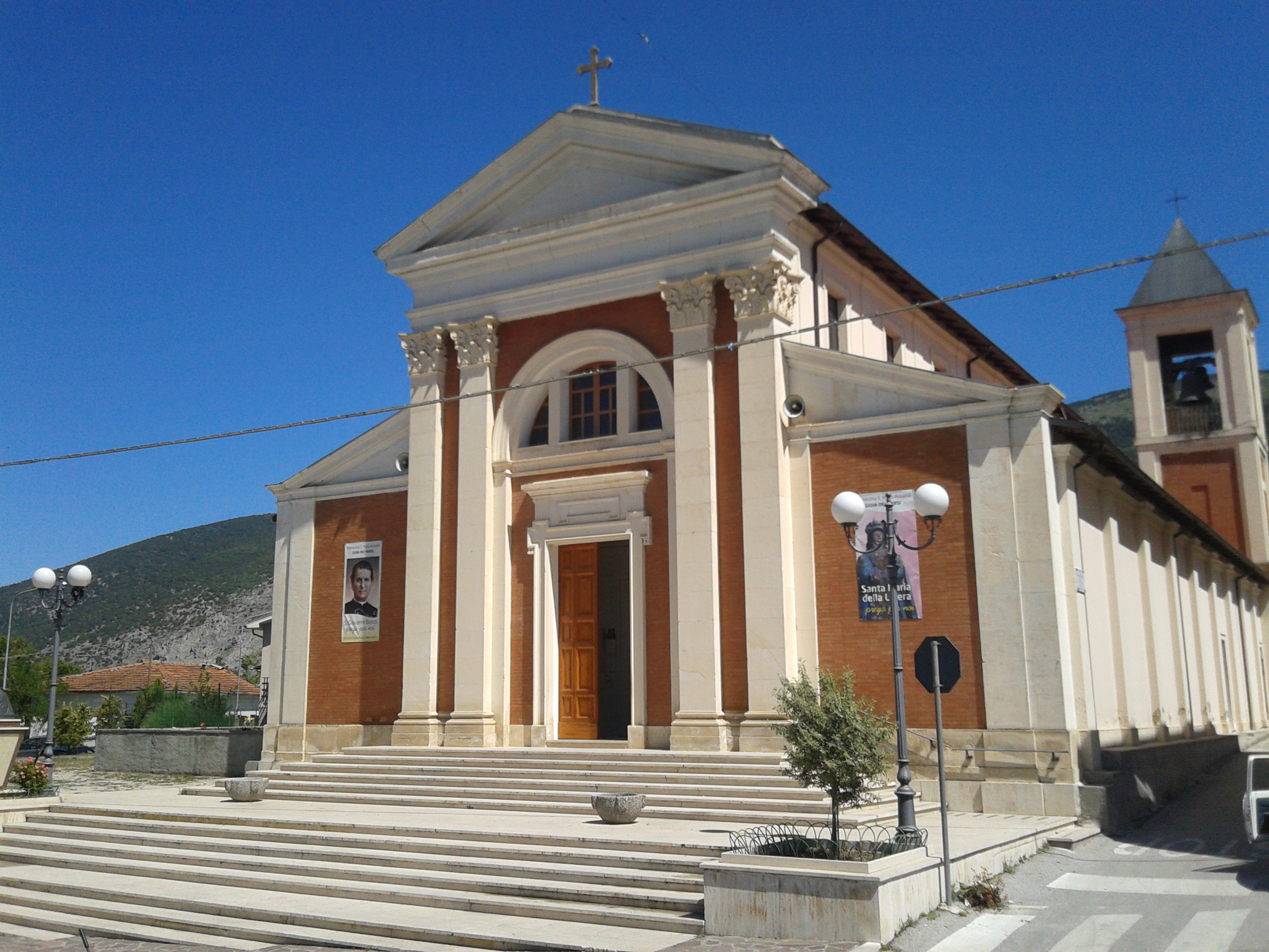 Chiesa Santa Maria Assunta